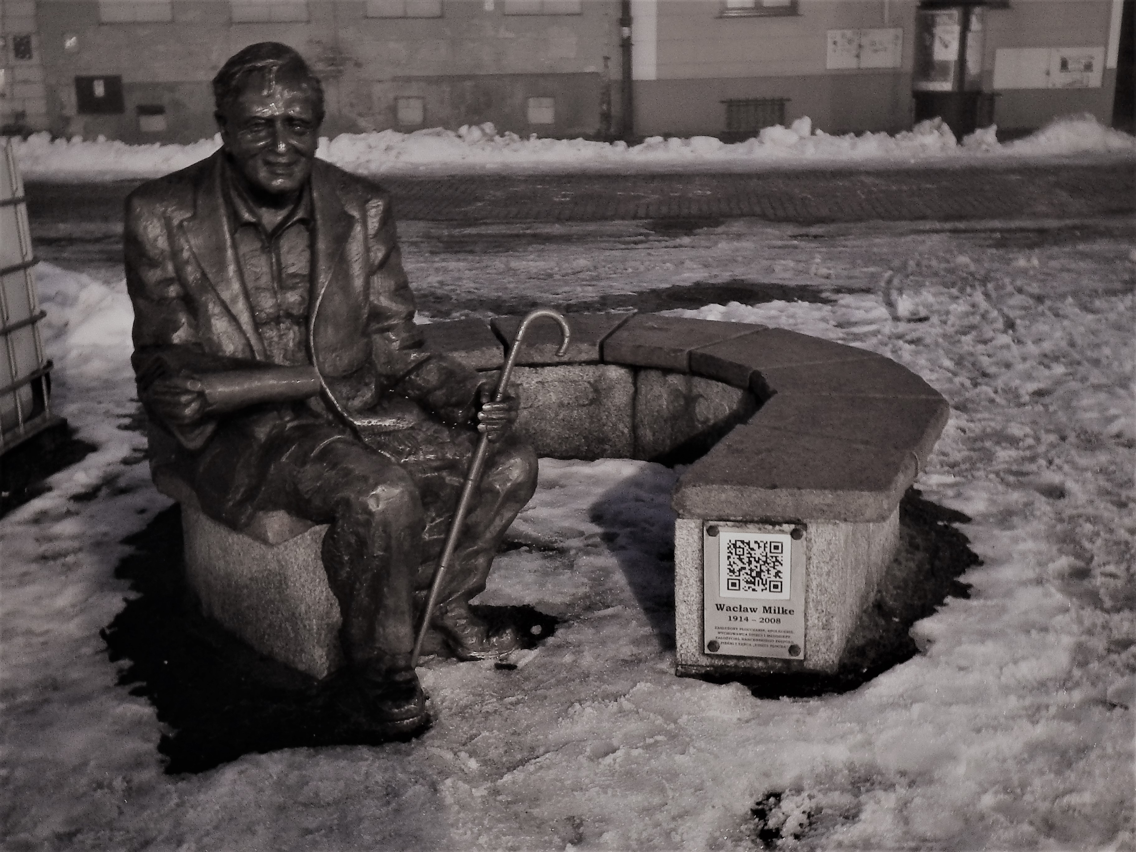 Pomnik – ławeczka Wacława Milkego na rynku w Płocku.